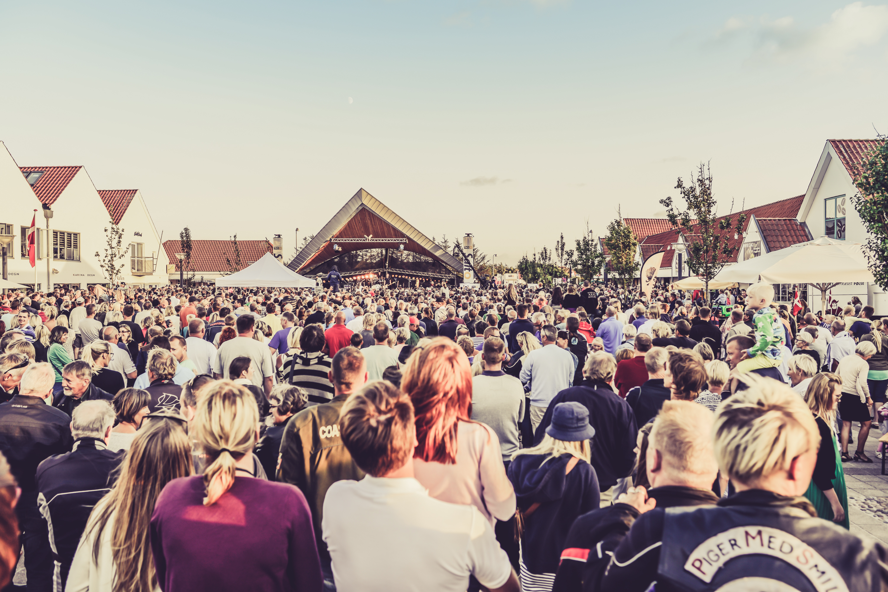 Torvet i Blokhus 2014